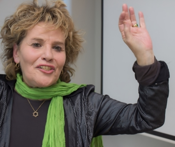 גליה ישי 2016